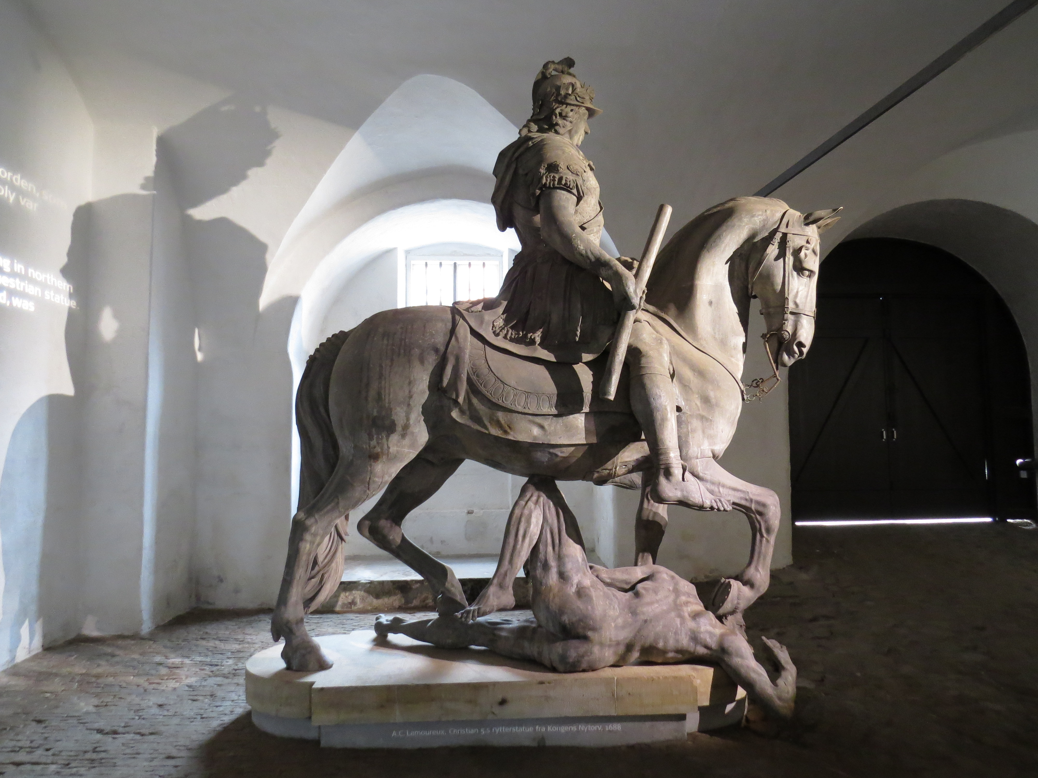 Abraham-César Lamoureux' originale statue af kong Christian V af Danmark og Norge, Kongernes Lapidarium, København